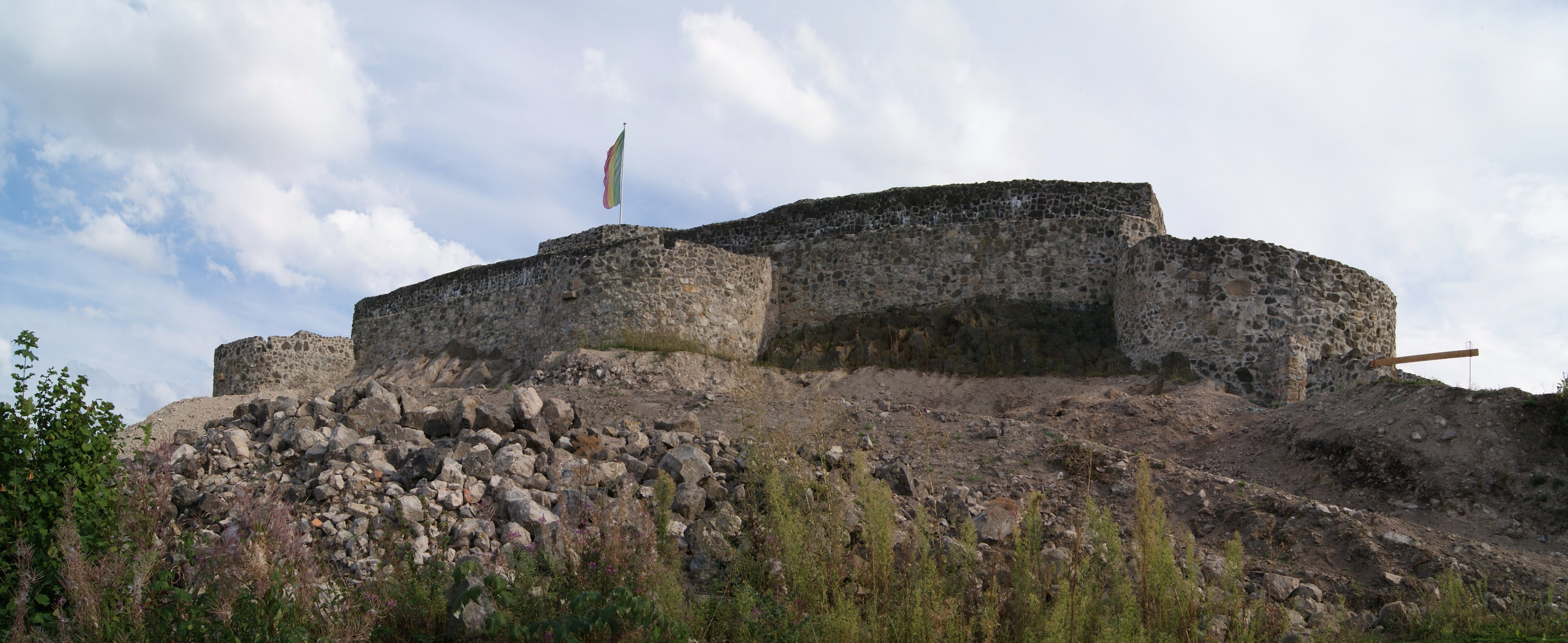 Nordansicht der Burgruine Waldeck (Oberpfalz)This is a photograph of an architectural monument.